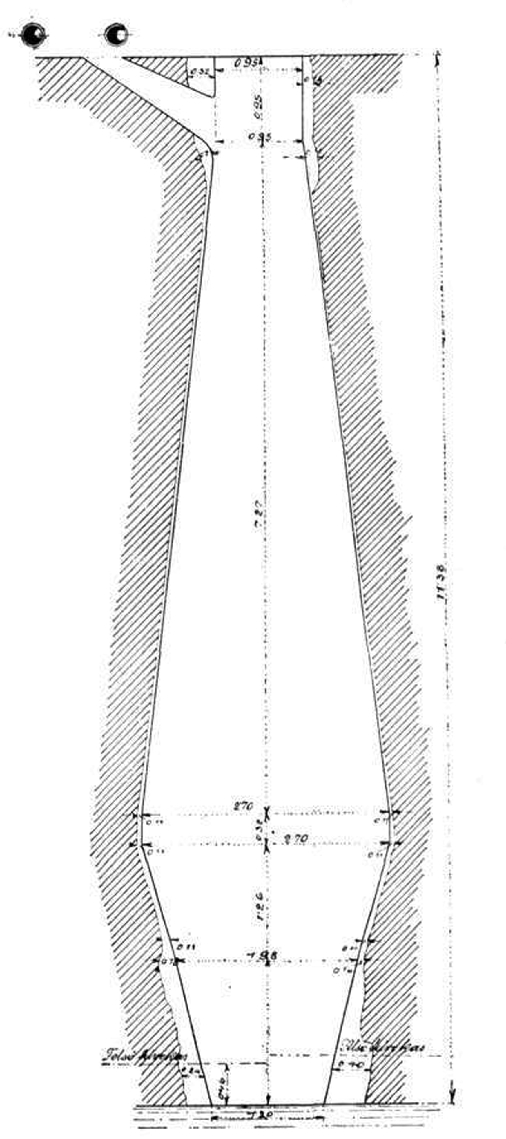 A Govasdiai (Ó-Limperti) nagyolvasztó szelvénye 1856-ban a kifúvás után.